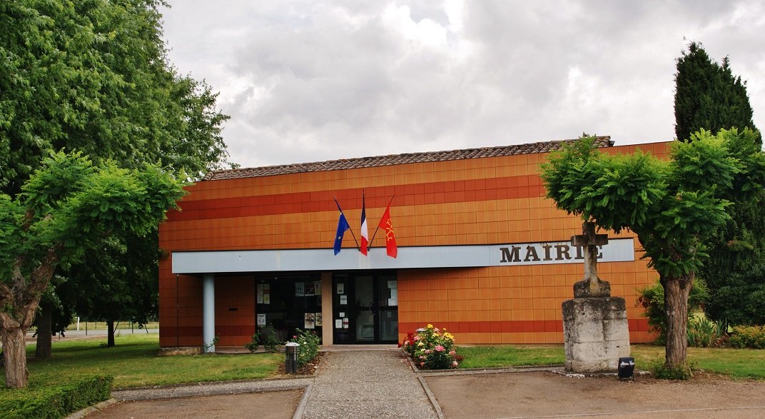 La Mairie